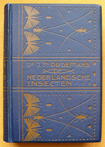 Boekomslag: Nederlandsche insecten. 2e druk 1908. Auteur: J.T. Oudemans. Bandontwerp: G. van de Wall Perné. Uitgeverij: W.J. Thieme